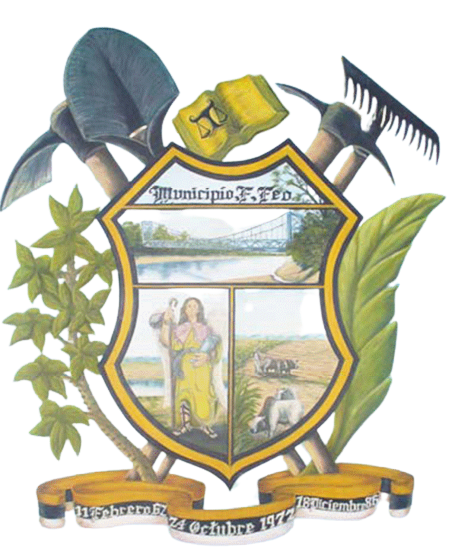 Escudo del municipio Fernández Feo, estado Táchira, Venezuela